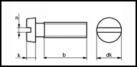 ISO 1207